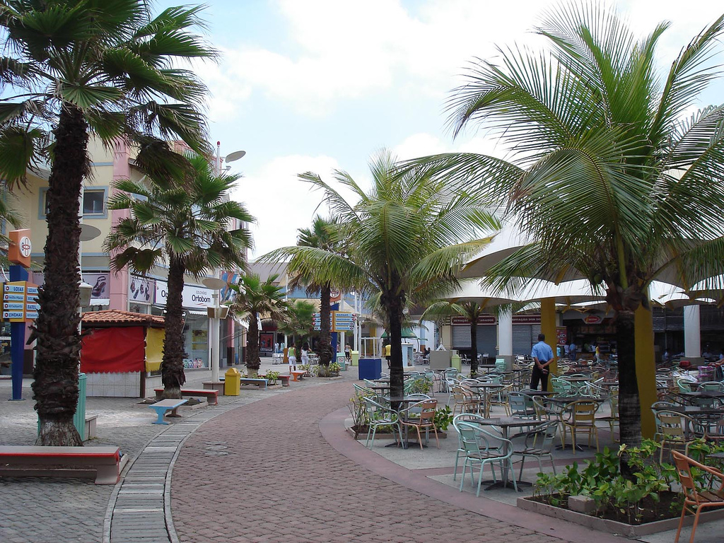 Aeroclube